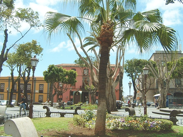 selbst erstellt am 20.4.05 Lizenz